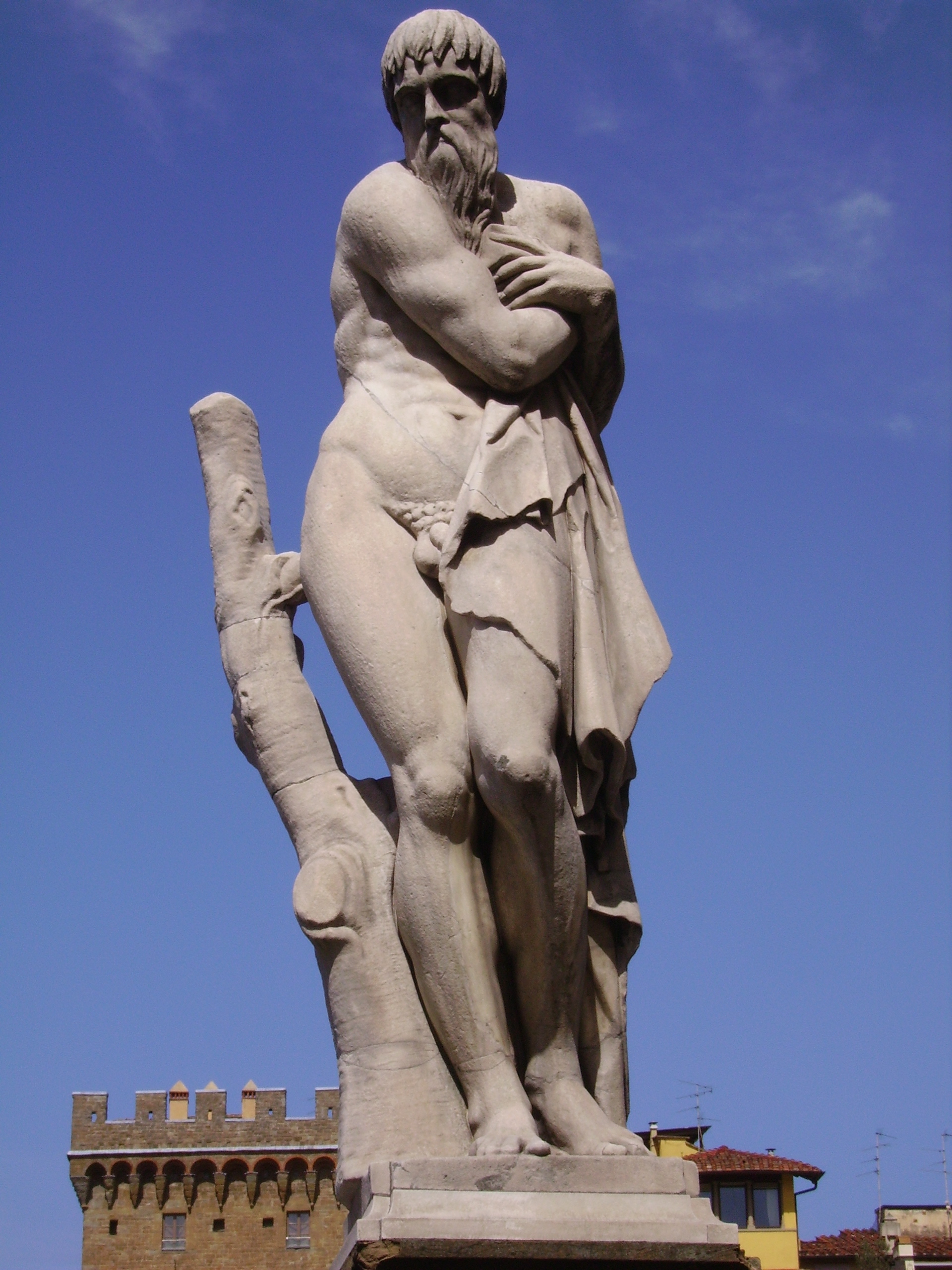 Taddeo Landini, L'Inverno. Statua all'imbocco di Ponte Santa Trìnita a Firenze. Photographer: Yair Haklai, April 2008